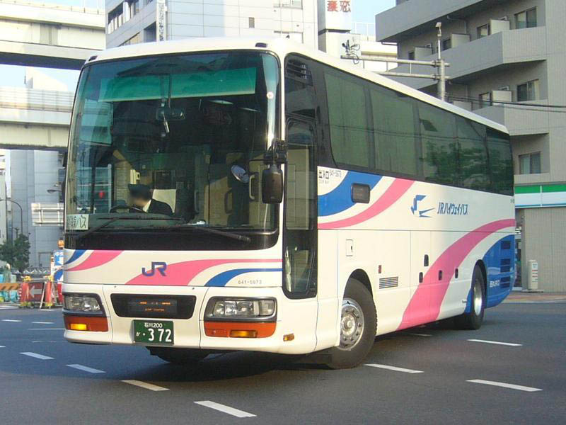 登録番号：石川200か・372 西日本ジェイアールバス(West JR bus)所属 ドリーム金沢号用 いすゞ・ガーラ KL-LV781R2